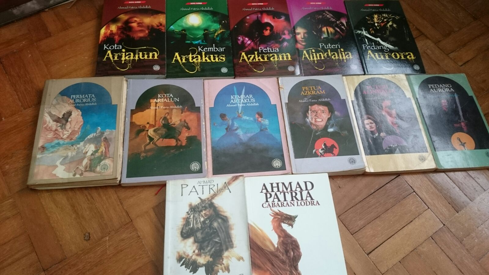 Buku 1 - 9 Saga Artakusiad. (Barisan atas adalah cetakan kedua)